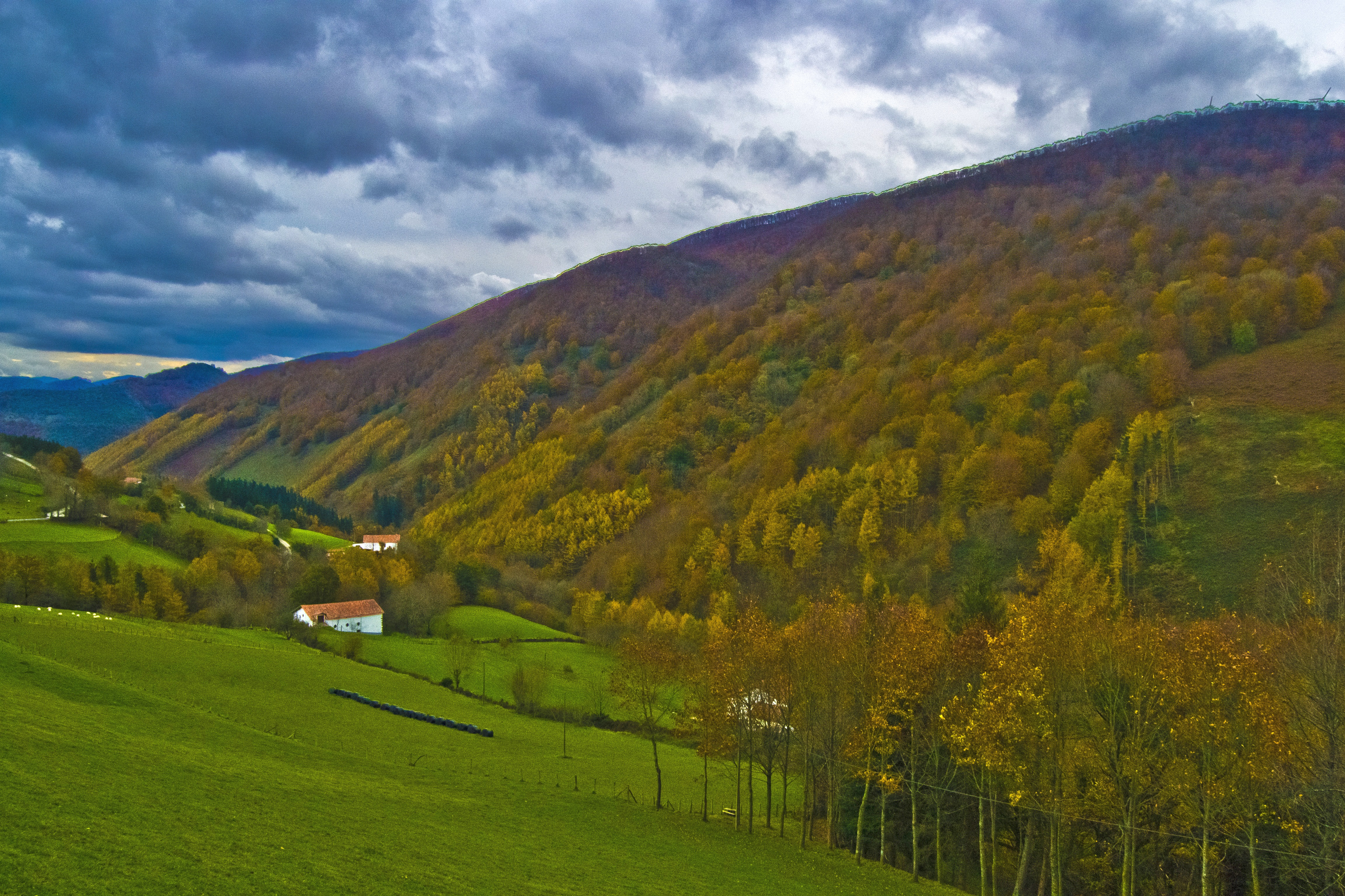 Ezkurra eta Malerreka. Navarre, Basque Country. Ezkurra and Malerreka. Nafarroa, Euskal Herria.